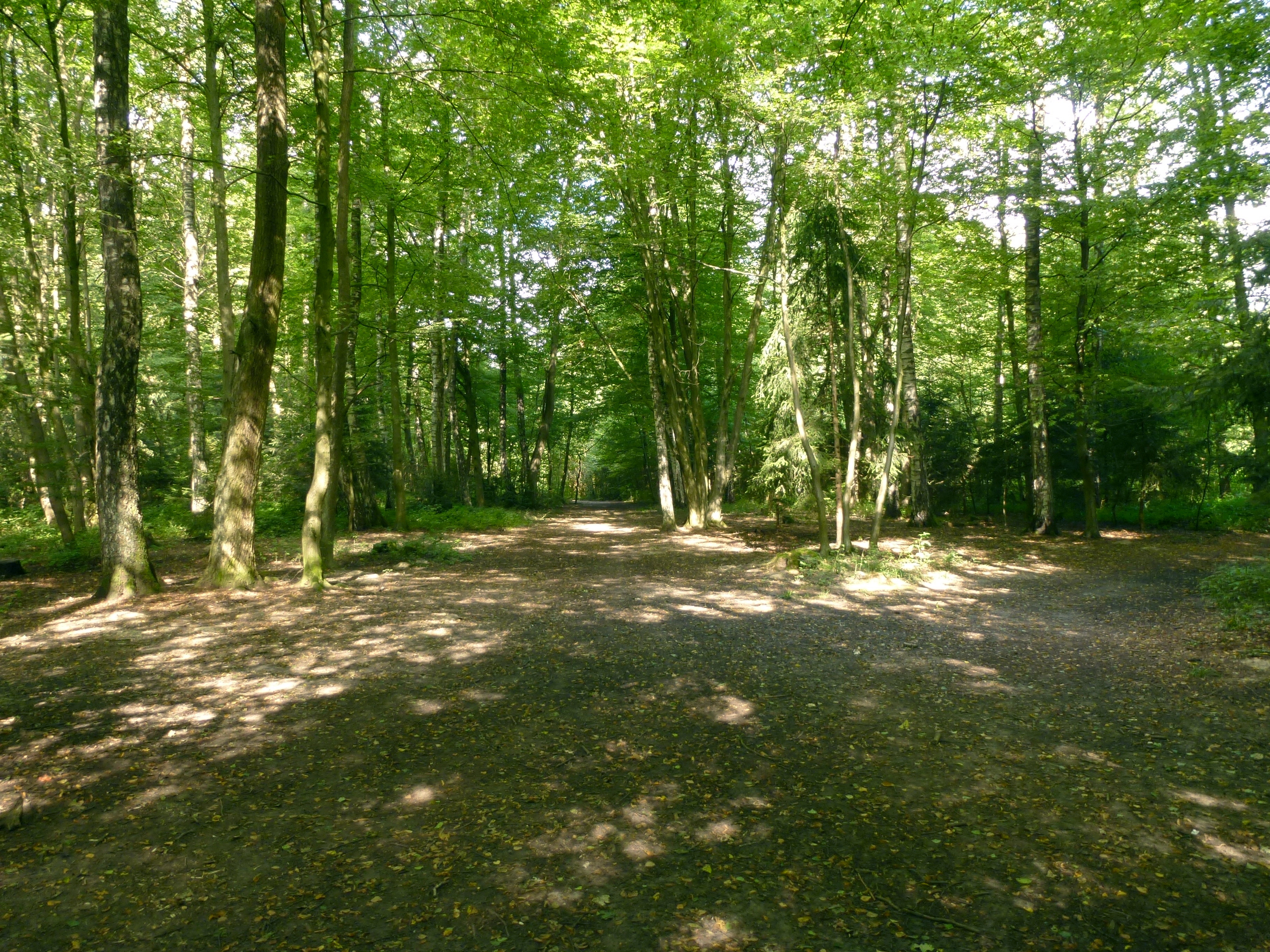 Scharwerkholz, Aufnahme bei:48,17496 N / 11,3369 O, Richtung WNW. Das Scharwerkholz, in der Bevölkerung als "Fuchsberg" angesprochen, ist ein lichtes Wäldchen südlich der S-Bahn-Linie. Hinzugehört aber auch ein schmaler Wald-Streifen nördlich der Bahnlinie und der Verbindungsstraße Eichenau-Puchheim. Dieser Teil nördlich der Bahnlinie ist (abgesehen von einem kleinen See-Idyll ganz im Westen) ziemlich verwildert und undurchdringlich